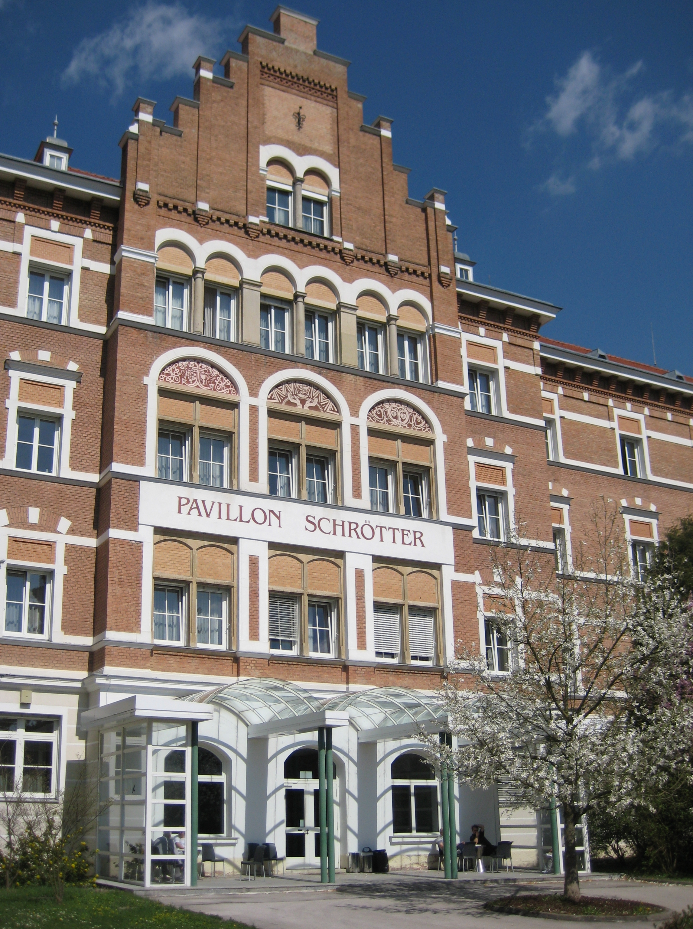 Leopold Schrötter von Kristelli - Lungenheilanstalt Alland - Pavillion Schrötter